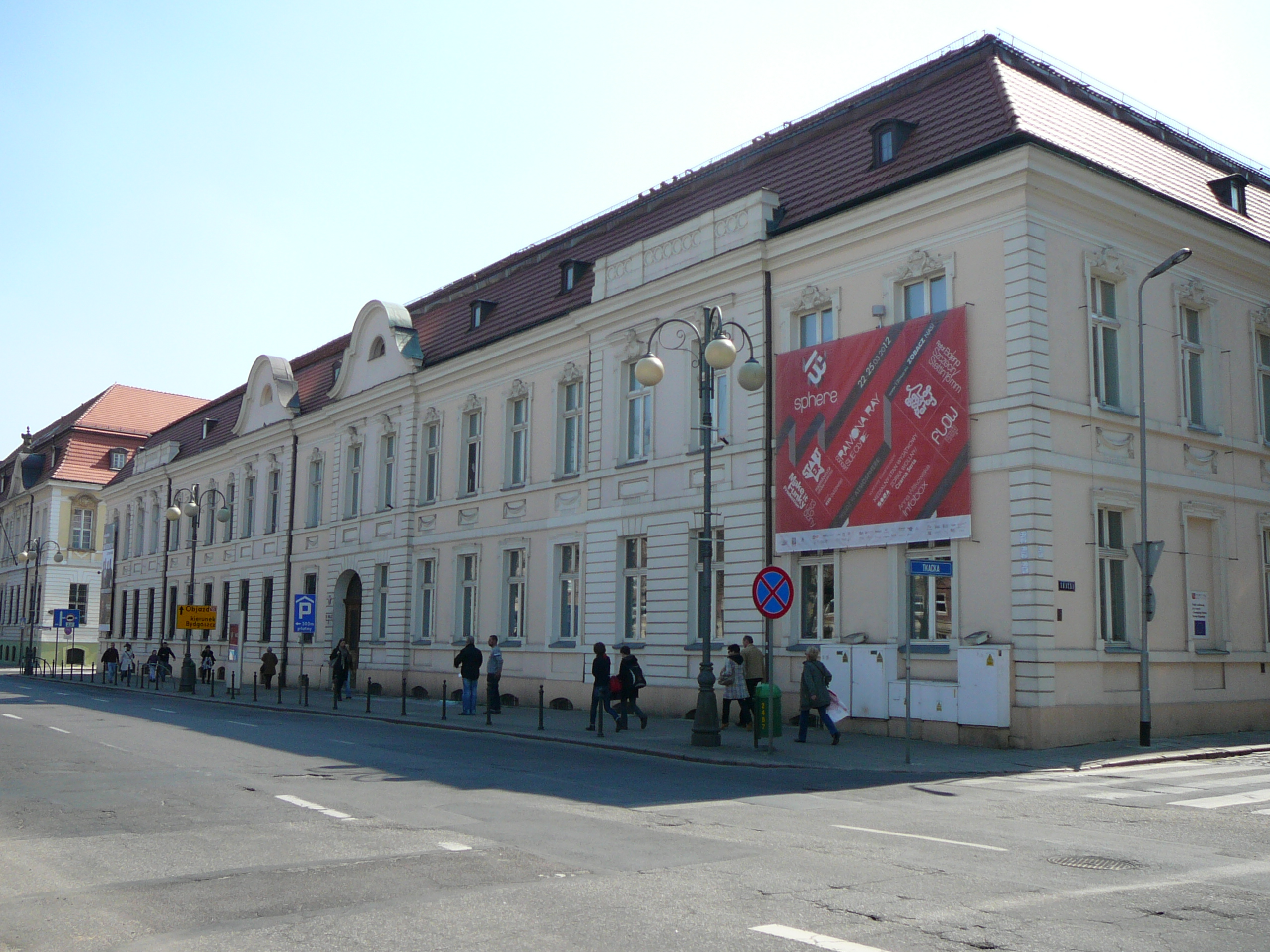 Budynek Klubu 13 Muz i Muzeum Sztuki Współczesnej (2012-04-19)